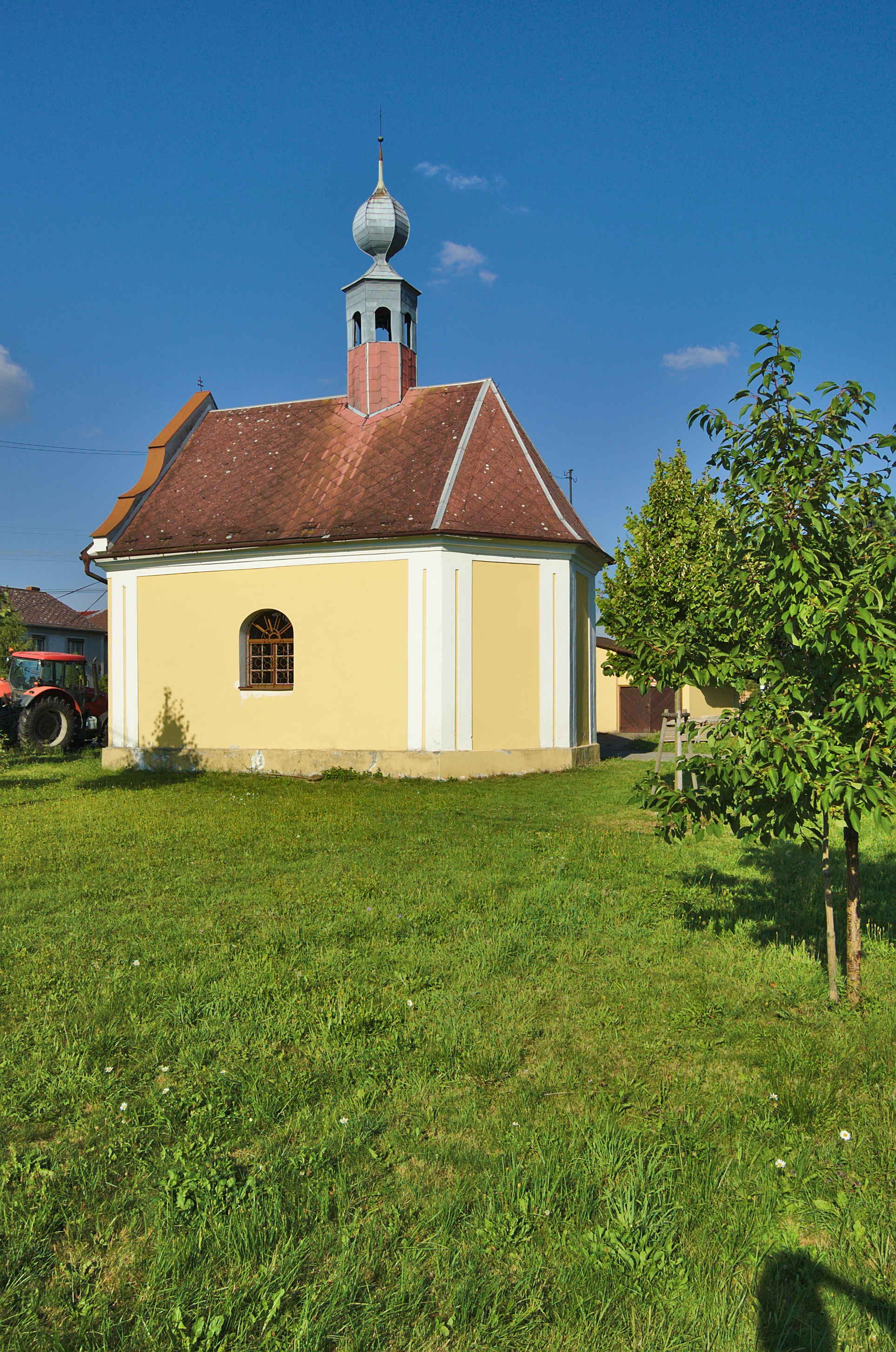 Kaple Nejsvětější Trojice, Hvozdečko, Bouzov, okres Olomouc